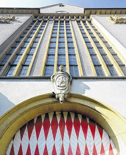 Eingangsfassade des Bad Kissinger Schlachthofes mit Büste; die Büste soll angeblich Bgm. Max Pollwein zeigen